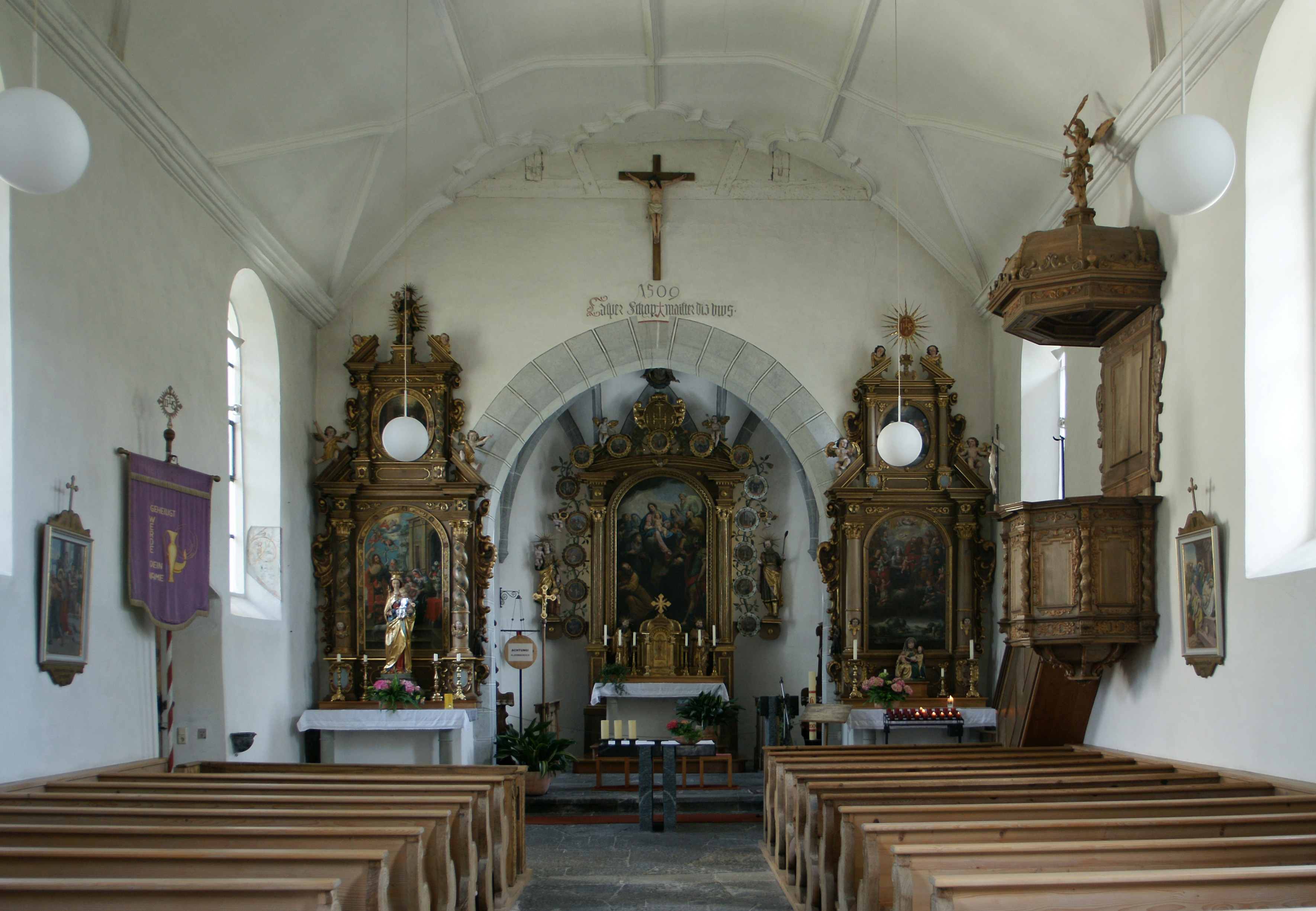 Kirche "hl. Anna" in Thüringen, Vorarlberg.